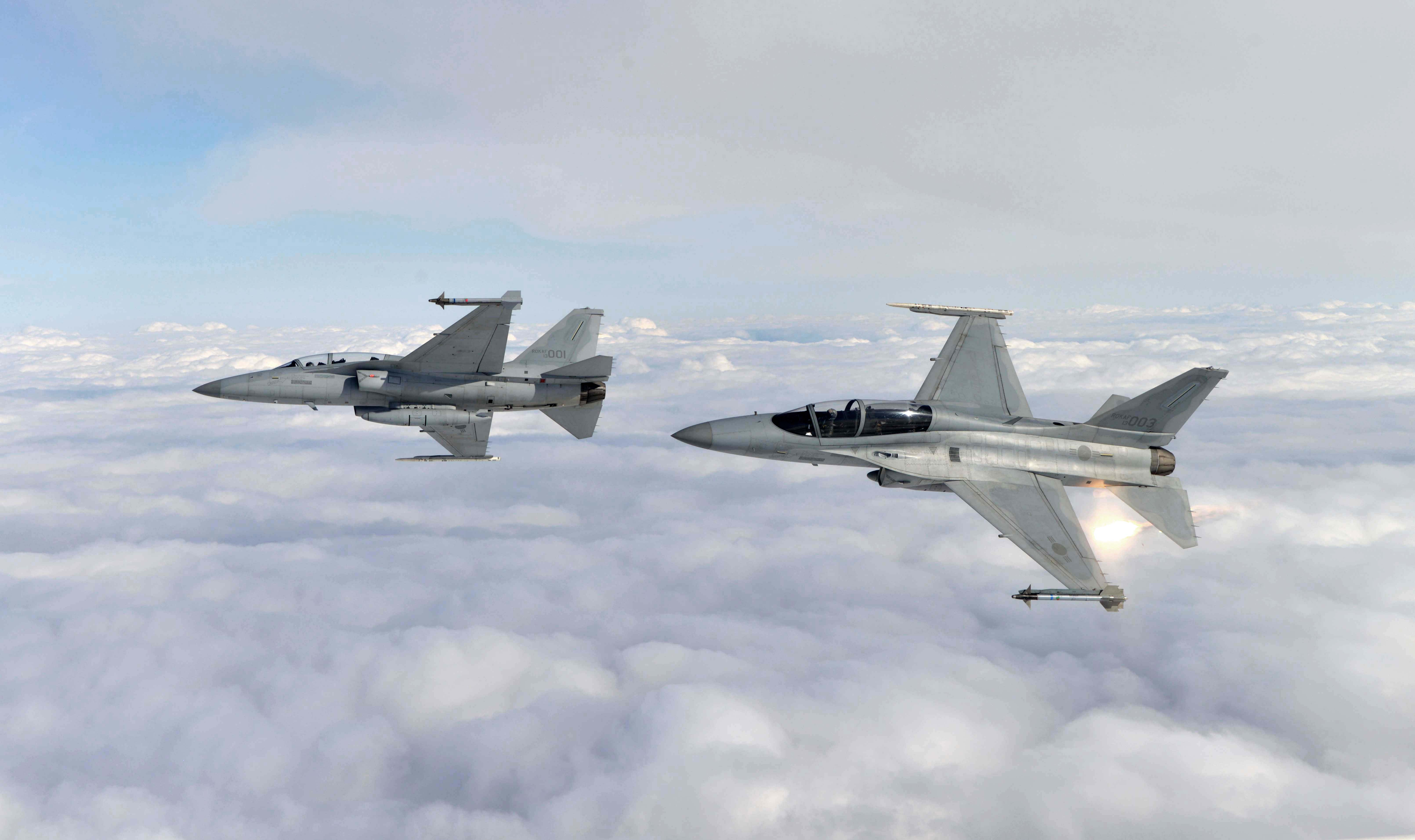 공군은 지난 2월 2일(월)부터 2주에 걸쳐 대규모 전역급 종합전투훈련인 '소링 이글(Soaring Eagle) 훈련'을 실시하고 있다. 사진은 대규모 종합전투훈련에 처음으로 참가한 국산전투기 FA-50 편대가 플레어 무장을 발사하며 기동하는 모습.